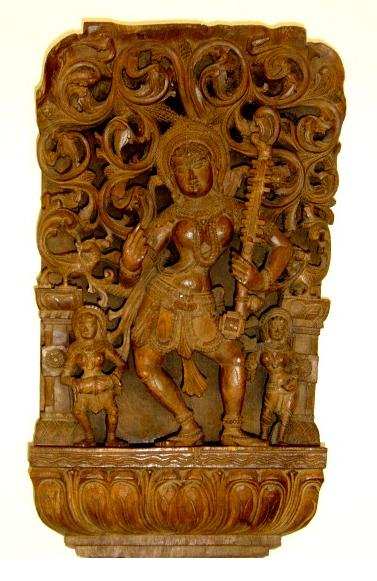 Sarasvati